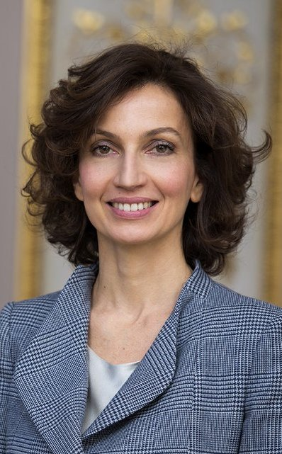 Audrey Azoulay, ministre de la Culture et de la Communication